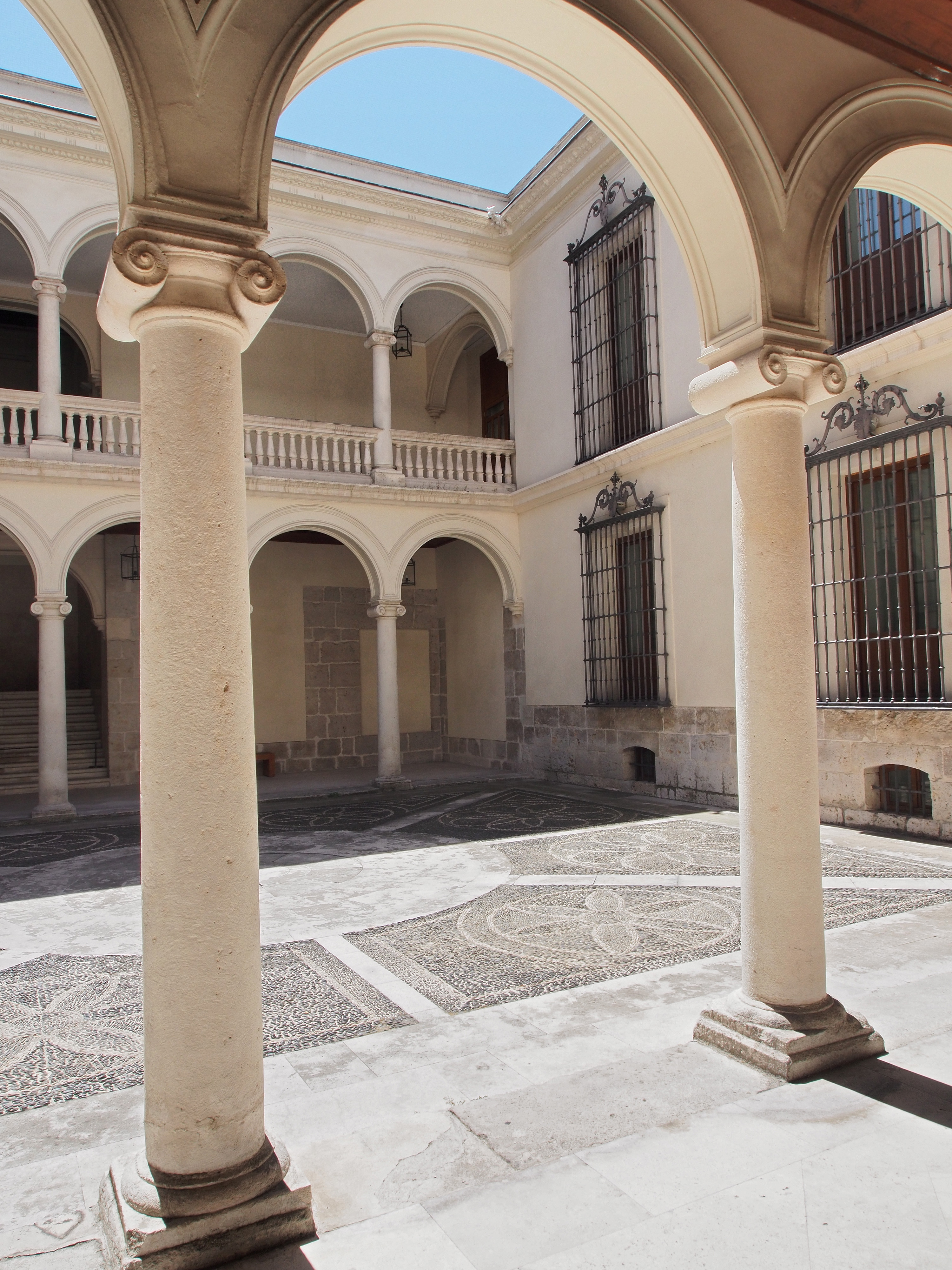 Palacio del Marqués de Villena, Valladolid; sede secundaria del Museo Nacional de Escultura.